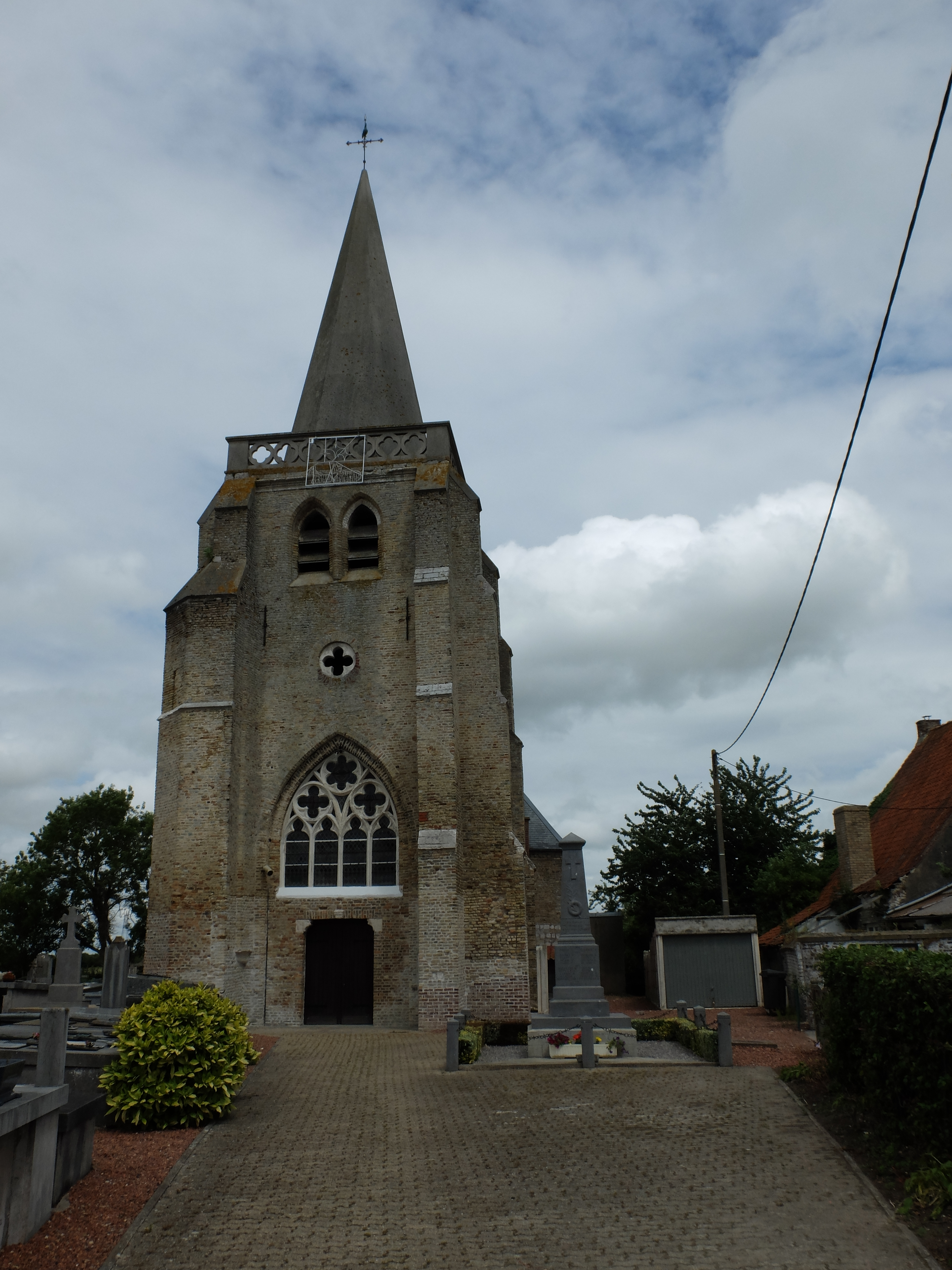 Vue de l'église Saint-Michel d'Holque. Le monument aux morts est également présent.